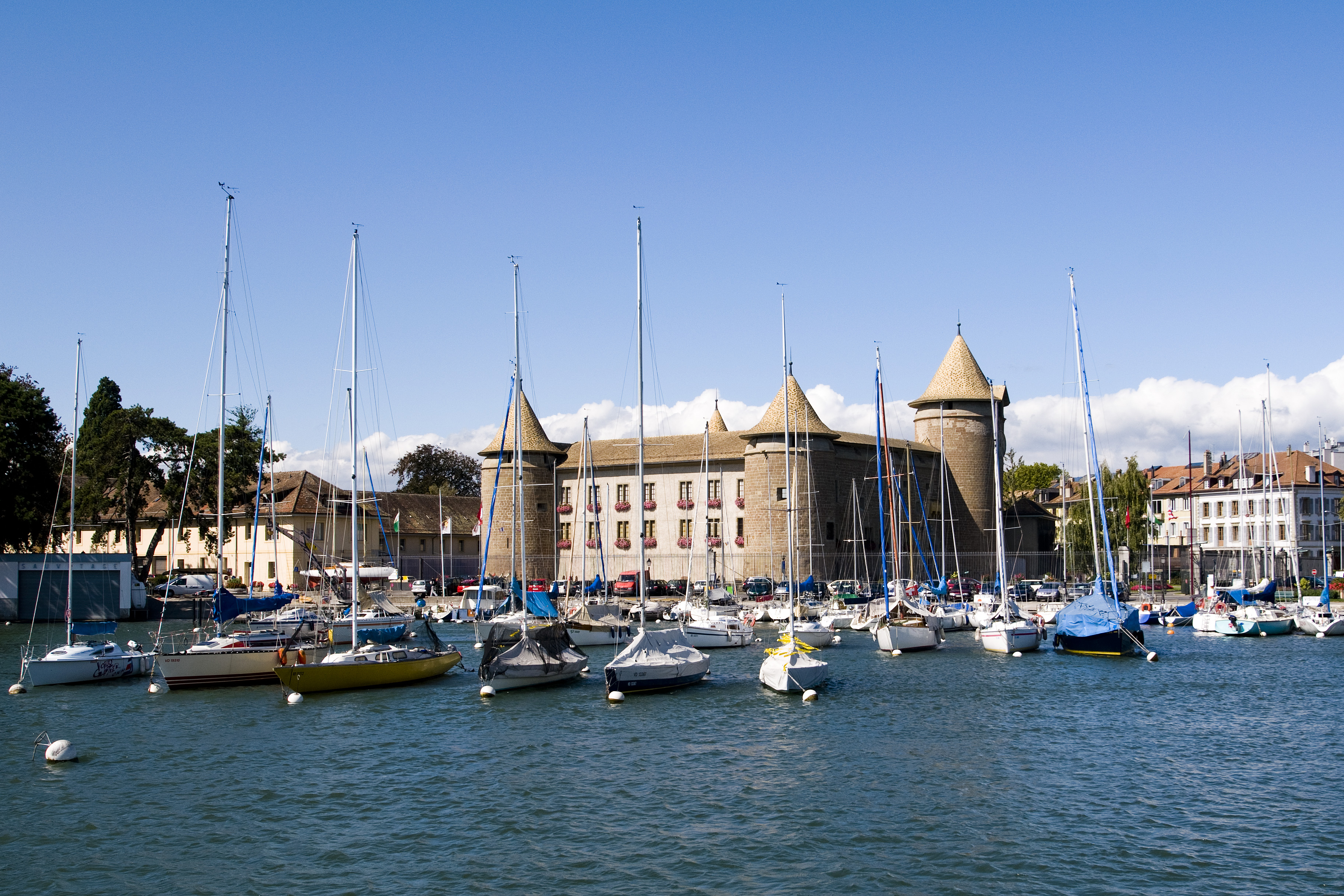 Château de Morges depuis le vieux port